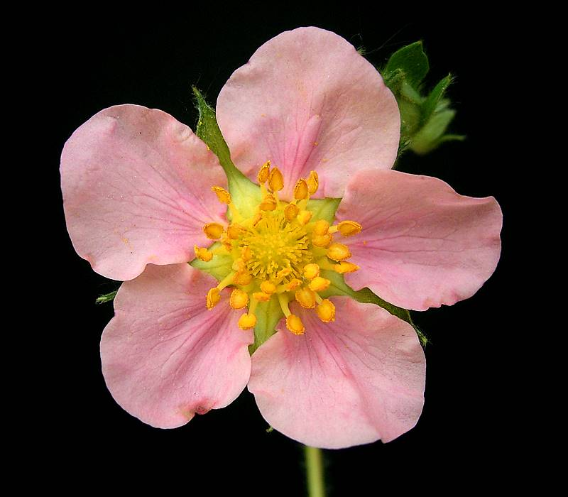 Fragaria × ananassa (Fragaria virginiana × Fragaria chiloensis) × Comarum palustre 'Pink Panda'